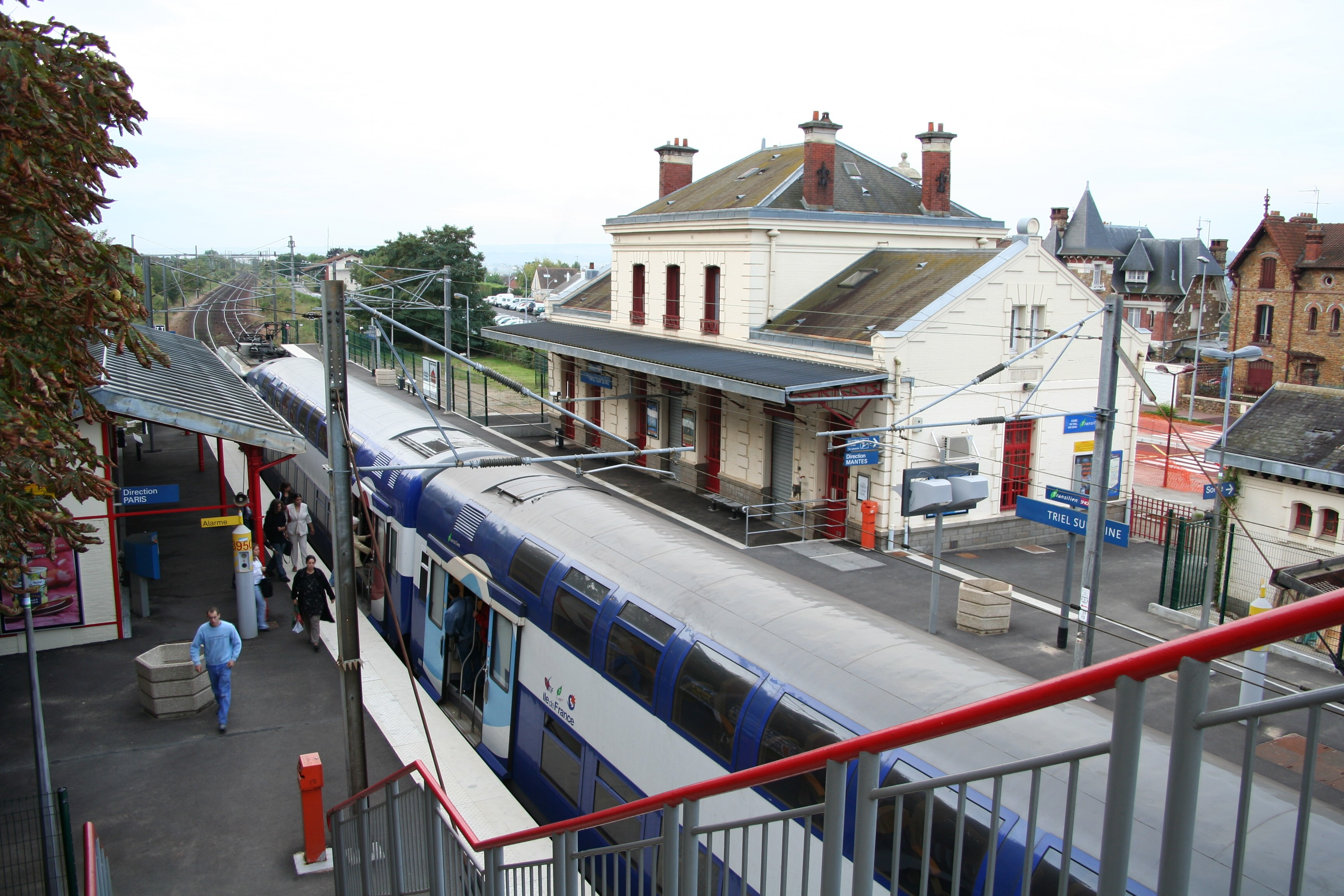 Gare de Triel-sur-Seine - Yvelines (France)